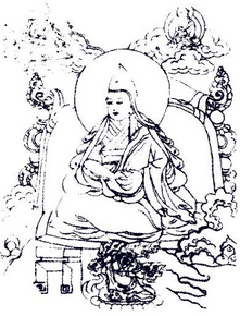 Далай-лама III.